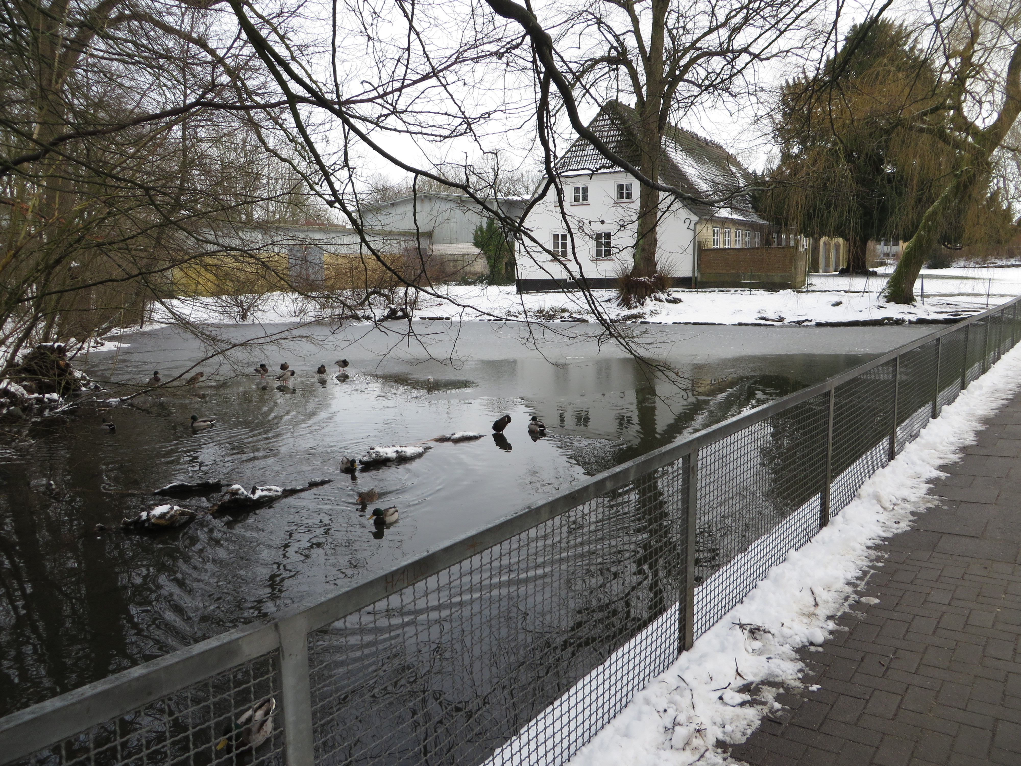 Alt-Fruerlundhof 1 mit Teich im Schnee (Januar 2015), Bild 01